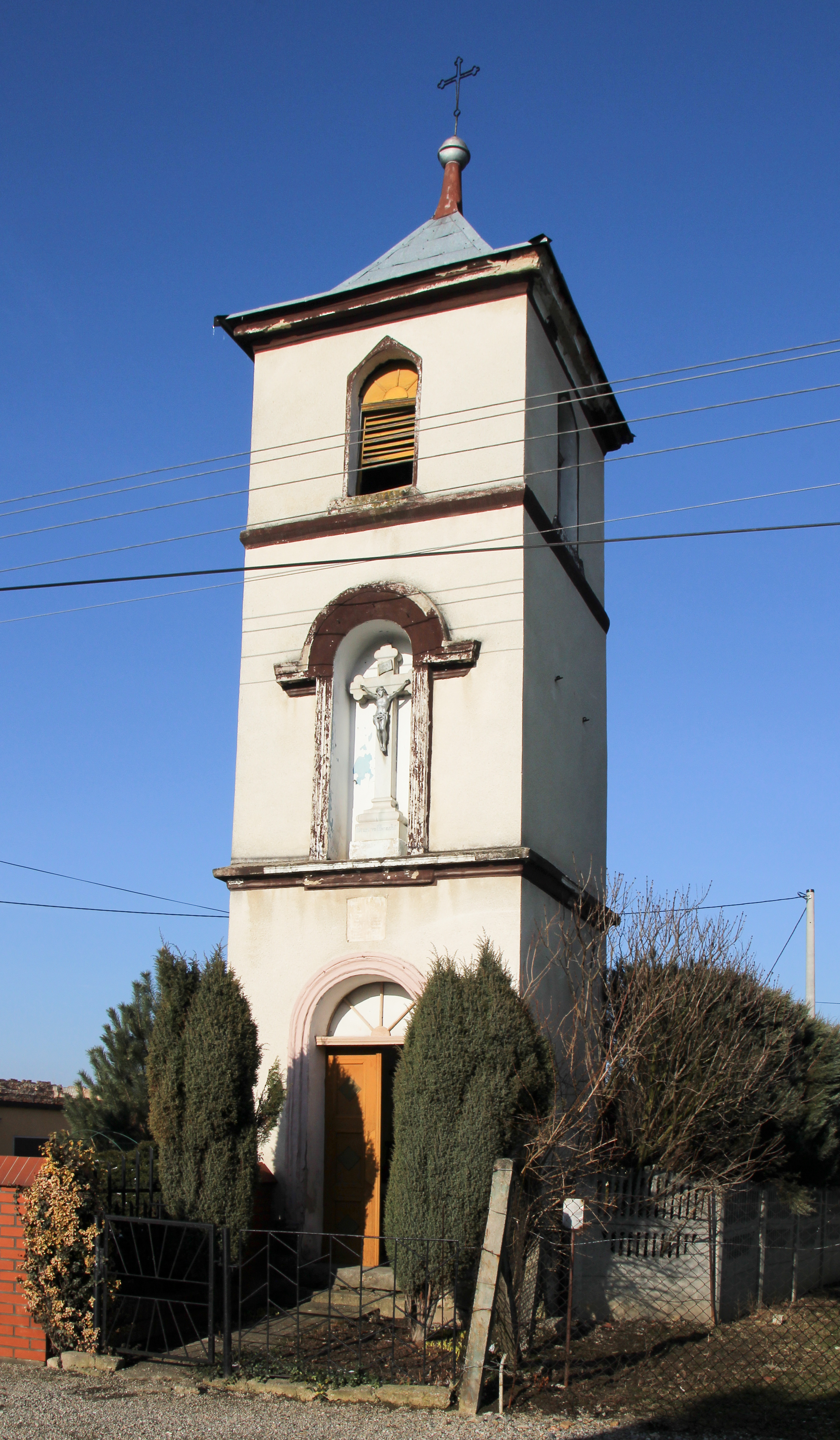 Morów – wieś w Polsce, w województwie opolskim, w powiecie nyskim, w gminie Nysa.